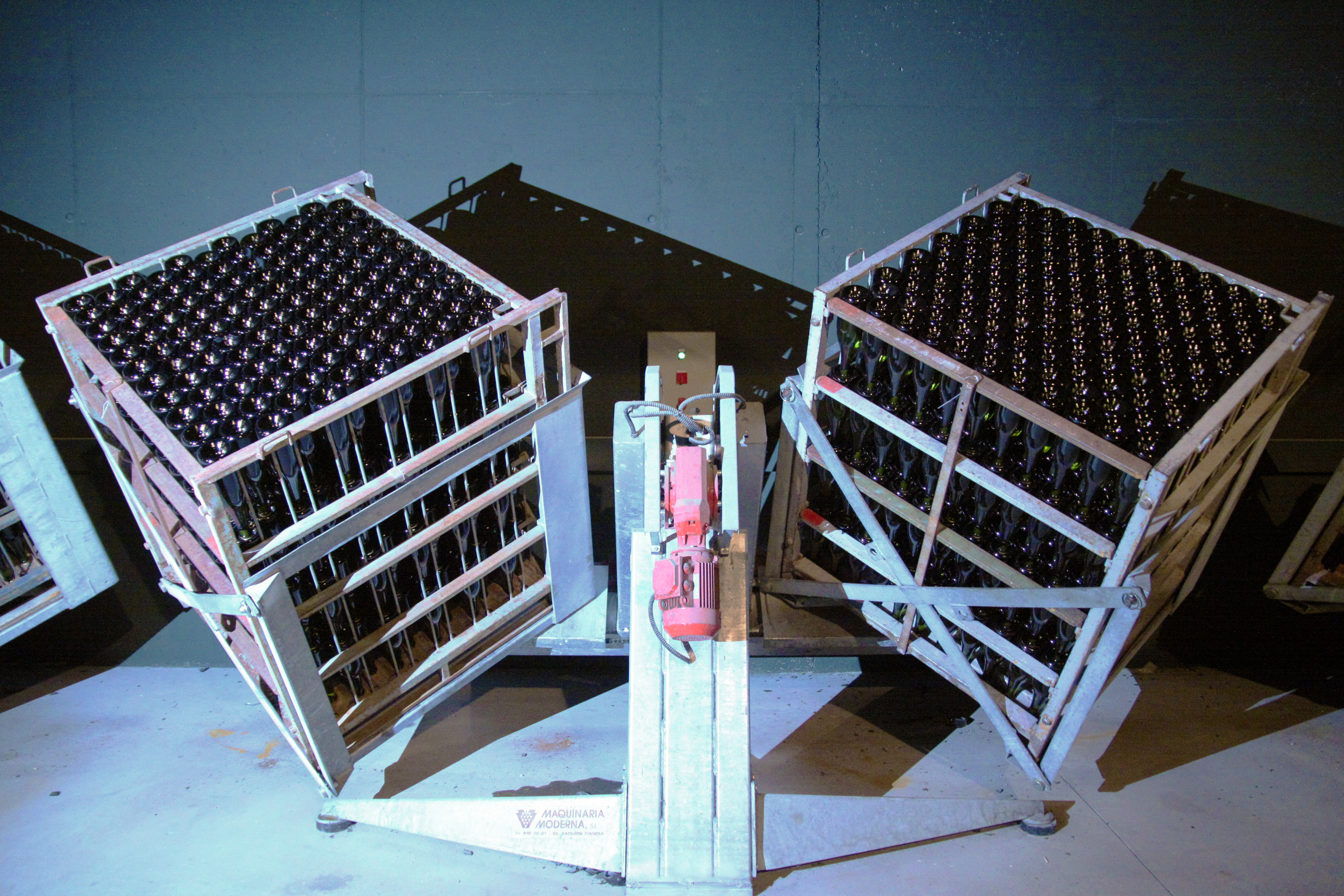 Remueur automatisé pour le remuage des vins effervescents